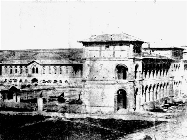 L'hôpital Marchant en construction à Toulouse.